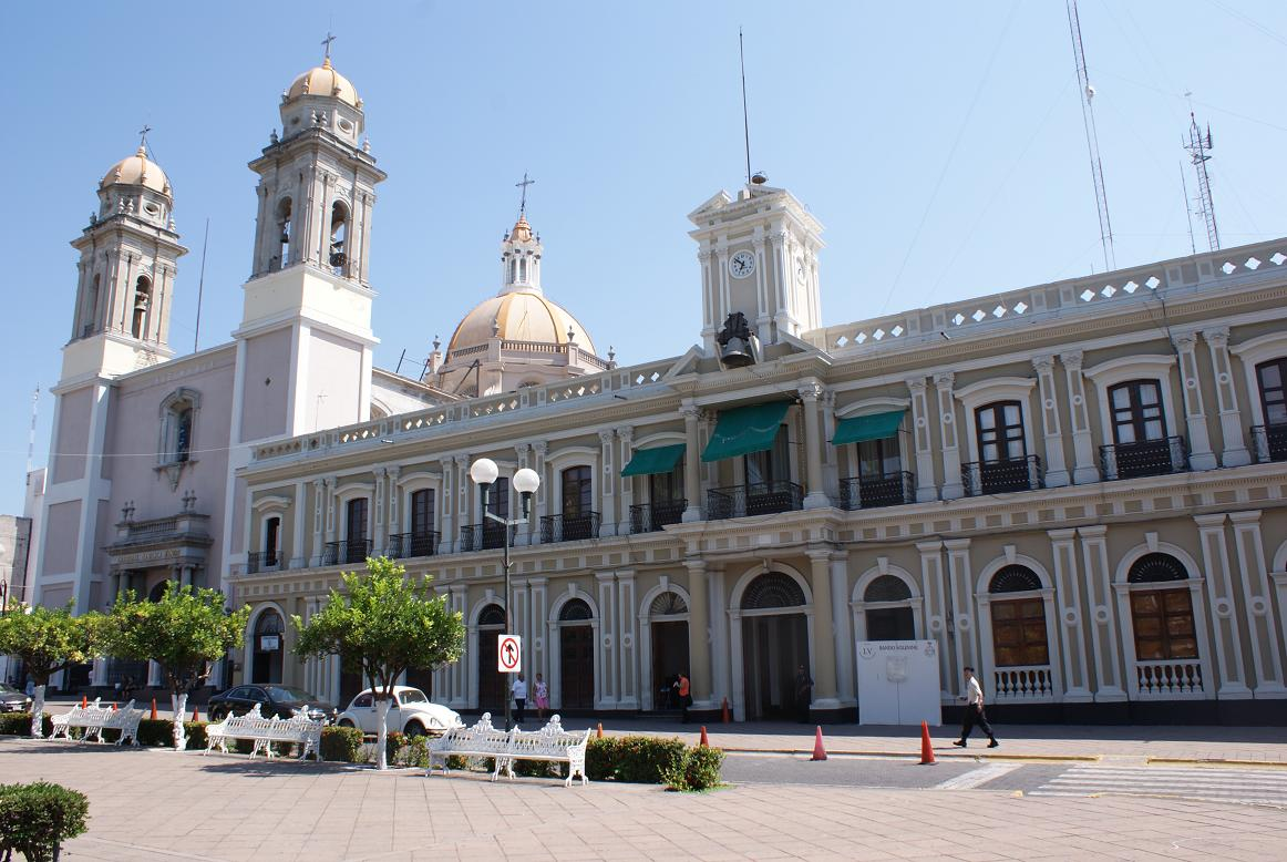 Catedral y Palacio